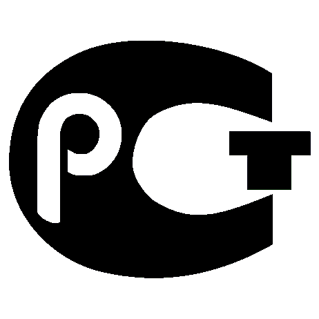 Symbol av Rostest